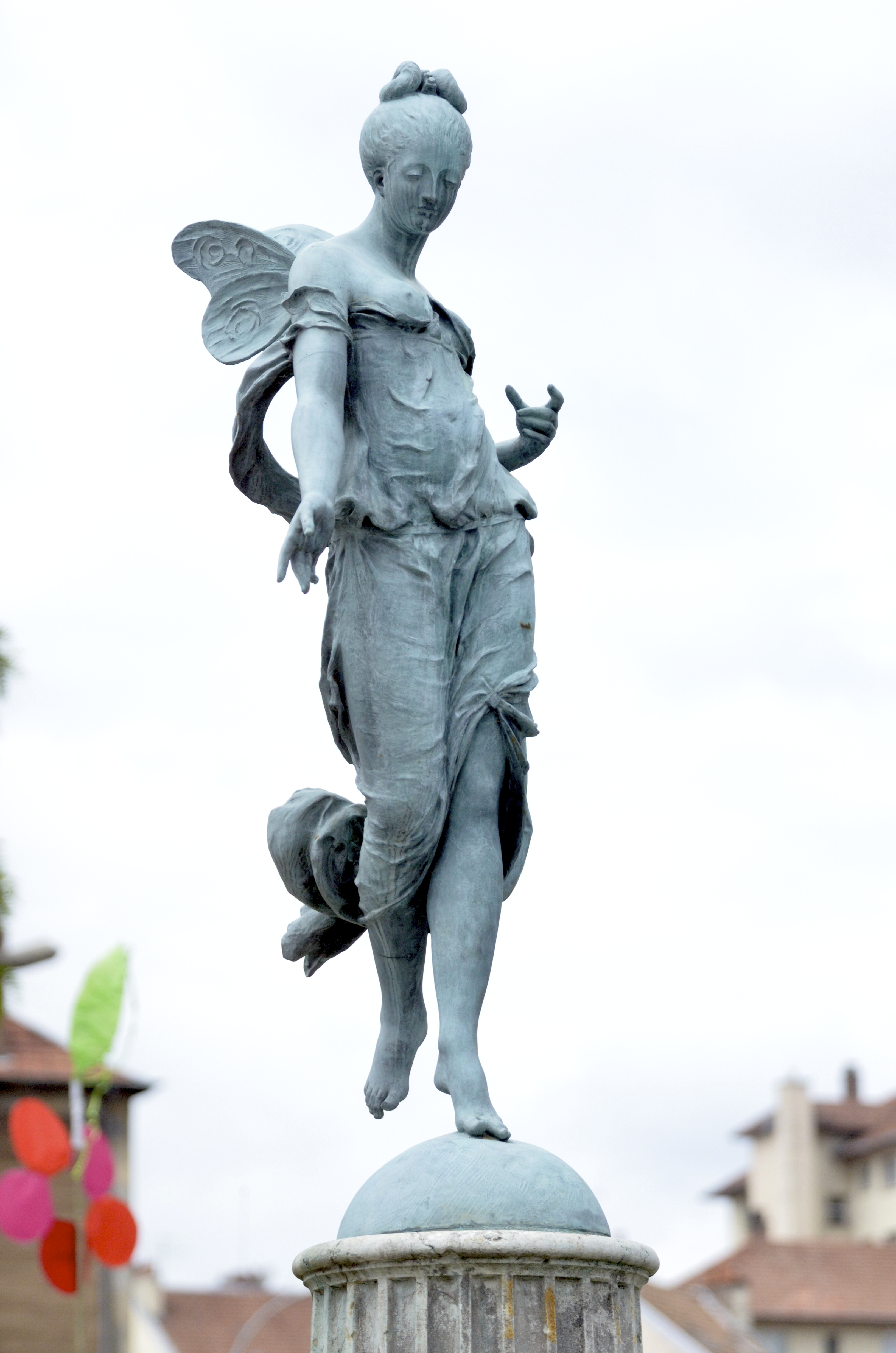 Statue de la déesse Flore à Besançon, installée sur la place éponyme, dans le quartier des Chaprais à Besançon.